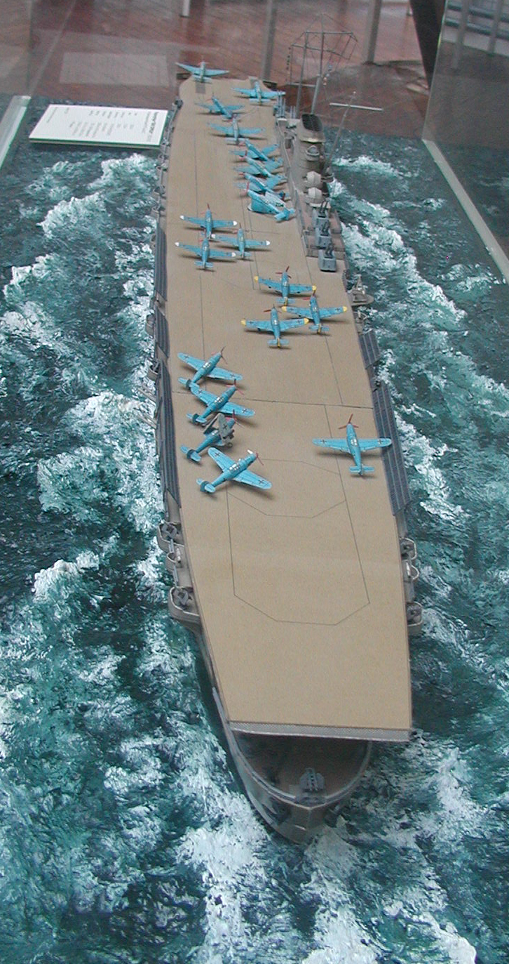 Ein Modell des Flugzeugträgers Graf Zeppelin im Aeronauticum Cuxhaven